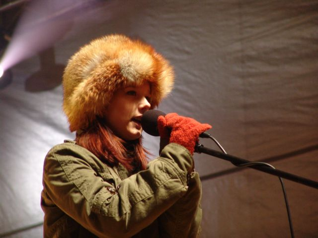 Autorem zdjęcia jest Przemysław Niepokój-Hepnar